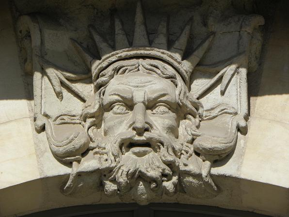 Mascaron de l'Hôtel de Blossac (Rennes)